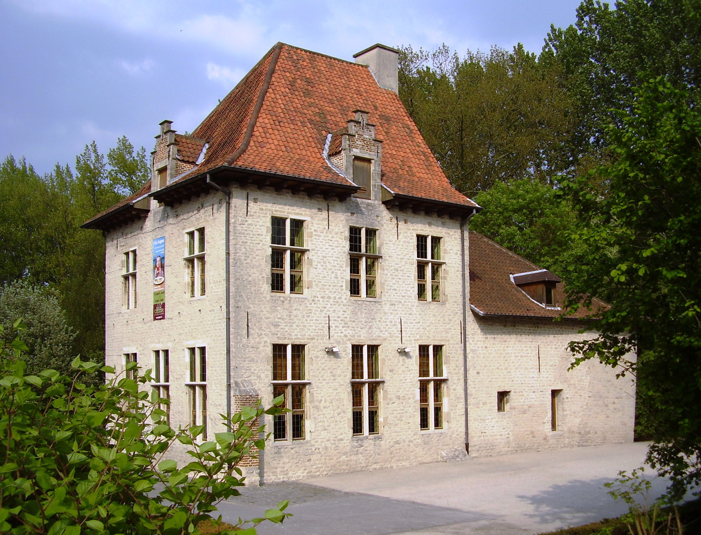 Le Slot, vestige du château des seigneurs de Woluwe XVIe siécle, Woluwe-Saint-Lambert (Bruxelles)